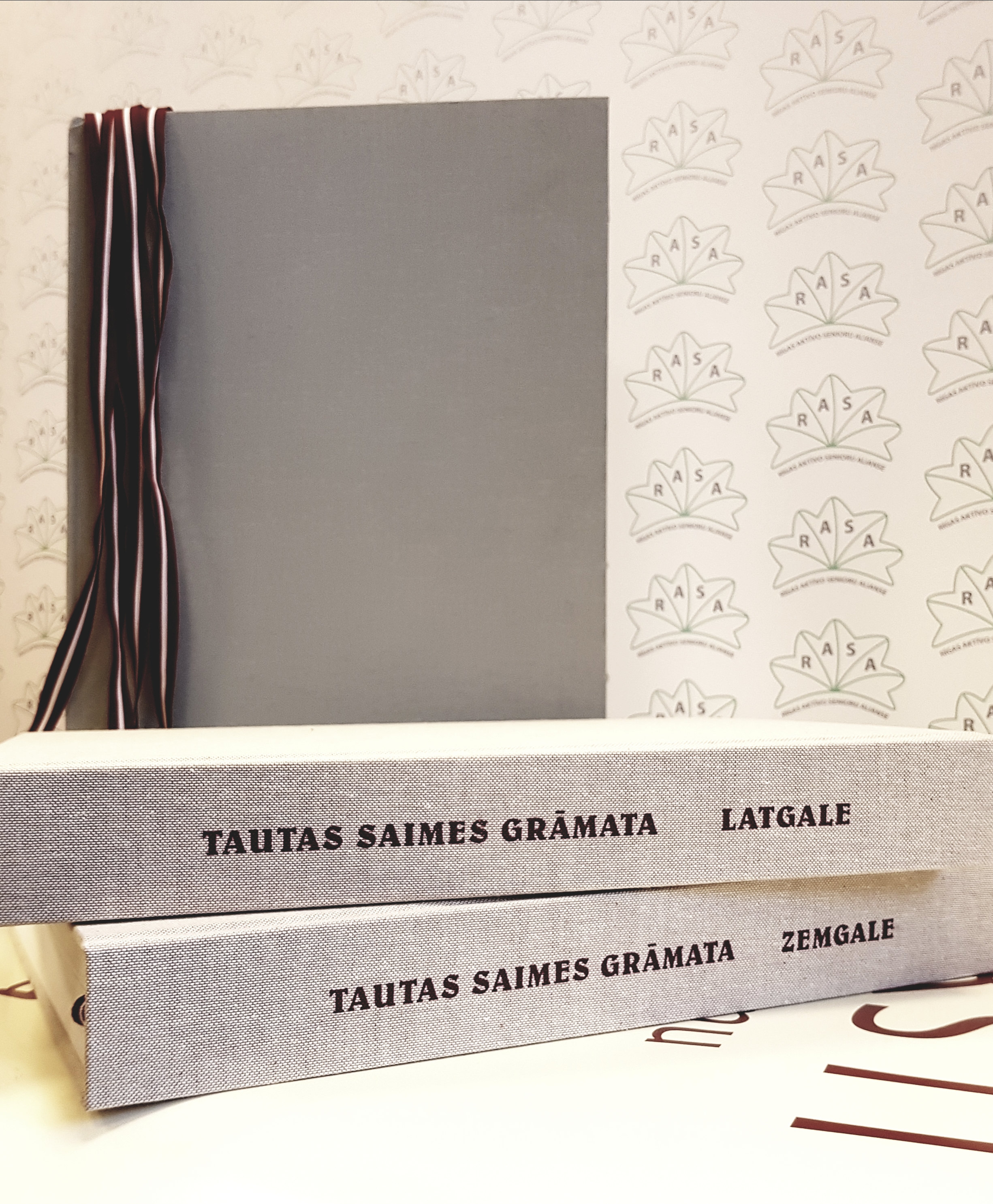 Pirmā TS grāmata